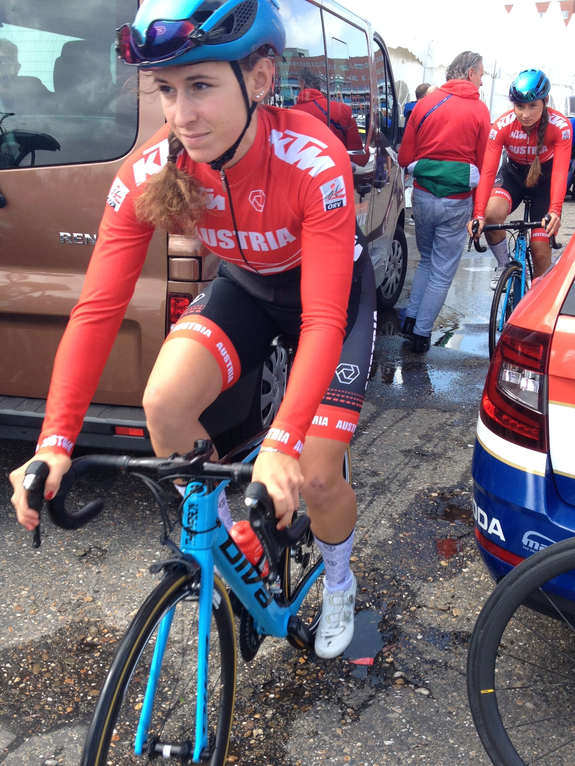 Wegwedstrijd voor vrouwen elite tijdens de Europese kampioenschappen wielrennen in Alkmaar op zaterdag 10 augustus 2019.